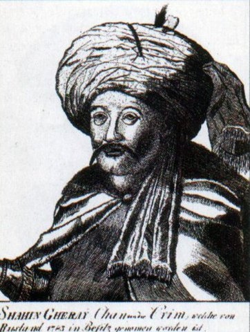 крымский хан Шахин-Гирей